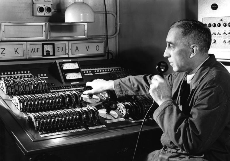 Hamburgische Staatsoper Meisterpult für Bühnenbeleuchtung (240 steuerbare Stromkreise) Erbaut: 1953-1955 Architekt: Gerhard Weber-Frankfurt Fassungsvermögen: 1649 Plätze Baukosten: 5,7 Millionen DM, davon 3,8 Millionen DM durch gemeinnützige Stiftung aufgebracht Eröffnung: 15.10.1955 mit Mozarts "Zauberflöte"